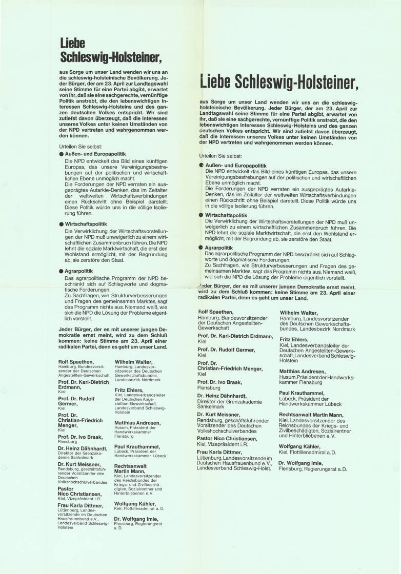 Liebe Schleswig-Holsteiner, aus Sorge um unser Land... Wir sind zutiefst davon überzeugt, daß die Interessen unseres Volkes unter keinen Umständen von der NPD vertreten und Wahrgenommen werden können. Urteilen Sie selbst: . Außen- und Europapolitik ... . Wirtschaftspolitik ... . Agrarpolitik ... Kommentar: Doppelspaltig bedruckt Plakatart: Textplakat Allgemein Objekt-Signatur: 10-012 : 265 Bestand: Landtagswahlplakate Schleswig-Holstein (10-012) GliederungBestand10-18: Landtagswahlplakate Schleswig-Holstein (10-012) » CDU Lizenz: KAS/ACDP 10-012 : 265 CC-BY-SA 3.0 DE